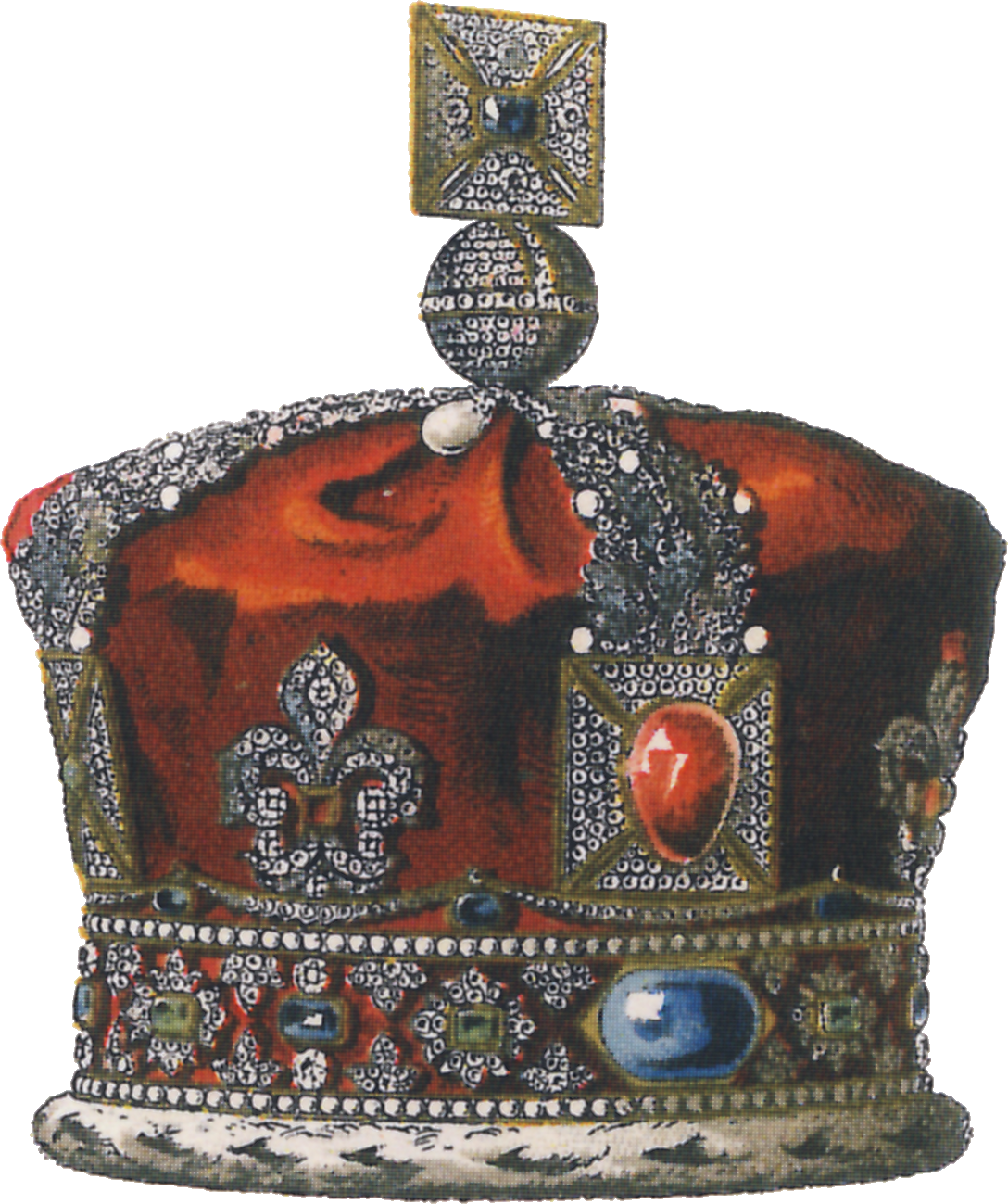 "Fig. 11. Staatskrone der Königin Victoria. Dieselbe wurde im Jahre 1838 von Mr. Rundell zu Bridge angefertigt und ist mit 3093 Juwelen geschmückt, darunter der beühmte Rubin, der dem Prinzen Eduard von Wales, genannt der schwarze Prinz, von Don Petro, König von Kastilien, gegeben worden sein soll. Als Modell diente die Krone König Karls II. […]." Imperial State Crown of the United Kingdom